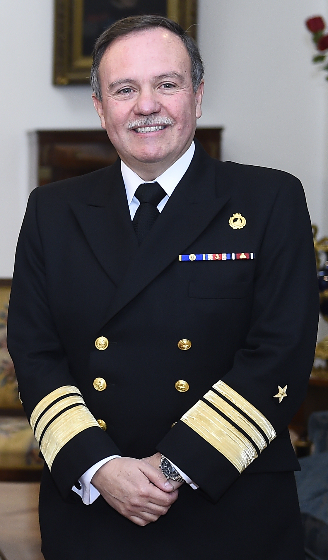 2 DE JUNIO DE 2017 Mandataria designó a nuevo Comandante en Jefe de la Armada de Chile. En el uso de la facultad que le otorga el artículo 104 de la Constitución Política de la República, la Presidenta de la República, Michelle Bachelet, designó al nuevo Comandante en Jefe de Armada de Chile, el Vicealmirante Julio Leiva Molina. Compartir a través de: El actual Vicealmirante realizó sus estudios en Los Ángeles, en el “Liceo Alemán del Verbo Divino”, para posteriormente ingresar a la Escuela Naval “Arturo Prat”, graduándose como guardiamarina en enero de 1980. En 1985 se graduó como especialista en Ingeniería Naval Electrónica y en 1996 recibió el título de Oficial de Estado Mayor, curso realizado en la Academia de Guerra Naval. Tras una larga trayectoria en la Armada, Leiva Molina asumió en diciembre de 2012 como Comandante en Jefe de la Primera Zona Naval, Comandante General de la Guarnición Naval de Valparaíso y Juez Naval de la Primera Zona Naval. En abril de 2014, es nombrado Jefe de la Defensa Nacional para el control del mega incendio de Valparaíso, acción que le valió la distinción de “Ciudadano Ilustre”, entregada por la Municipalidad de Valparaíso en abril de 2015. En enero de 2015, el Supremo Gobierno le confiere el ascenso al grado de Vicealmirante, y posteriormente asume como Director General del Personal de la Armada. El nuevo comandante en Jefe de la Armada asumirá sus nuevas funciones a partir del 18 de junio de 2017, reemplazando al actual Almirante Enrique Larrañaga Martin.